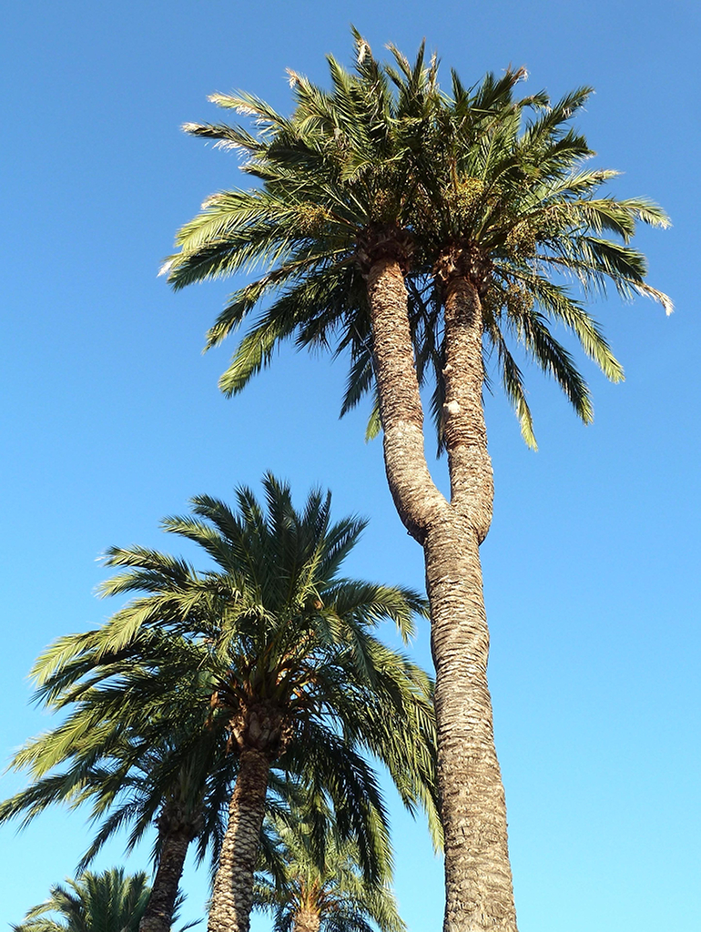 Phoenix dactylifera (palmera) - Un individuo poco corriente con tronco bífido - Plaza de Robles Vives, Águilas (Provincia de Murcia, España).